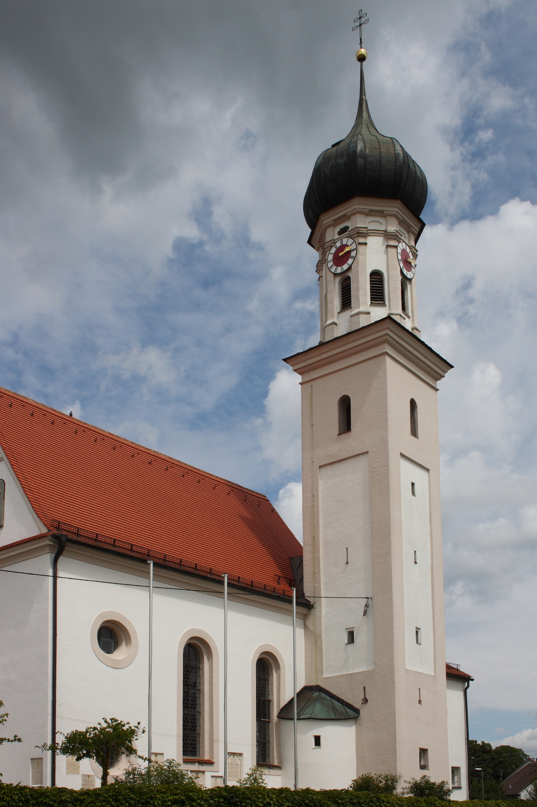 Katholische Pfarrkirche St. Laurentius in Agawang, einem Ortsteil von Kutzenhausen im Landkreis Augsburg (Bayern), 1732 von Joseph Dossenberger d. Ä. aus Wollishausen erbaut, Turm mit Zwiebelhaube